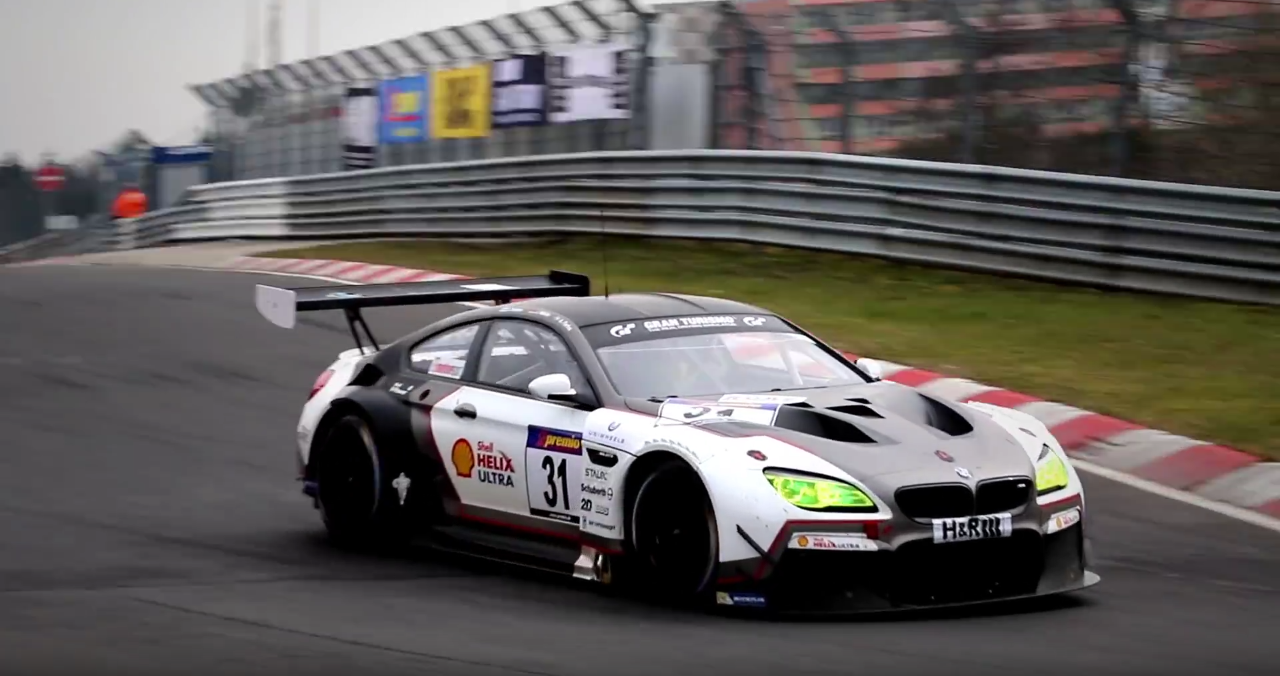 Schubert M6 GT3 auf dem Nürburgring.